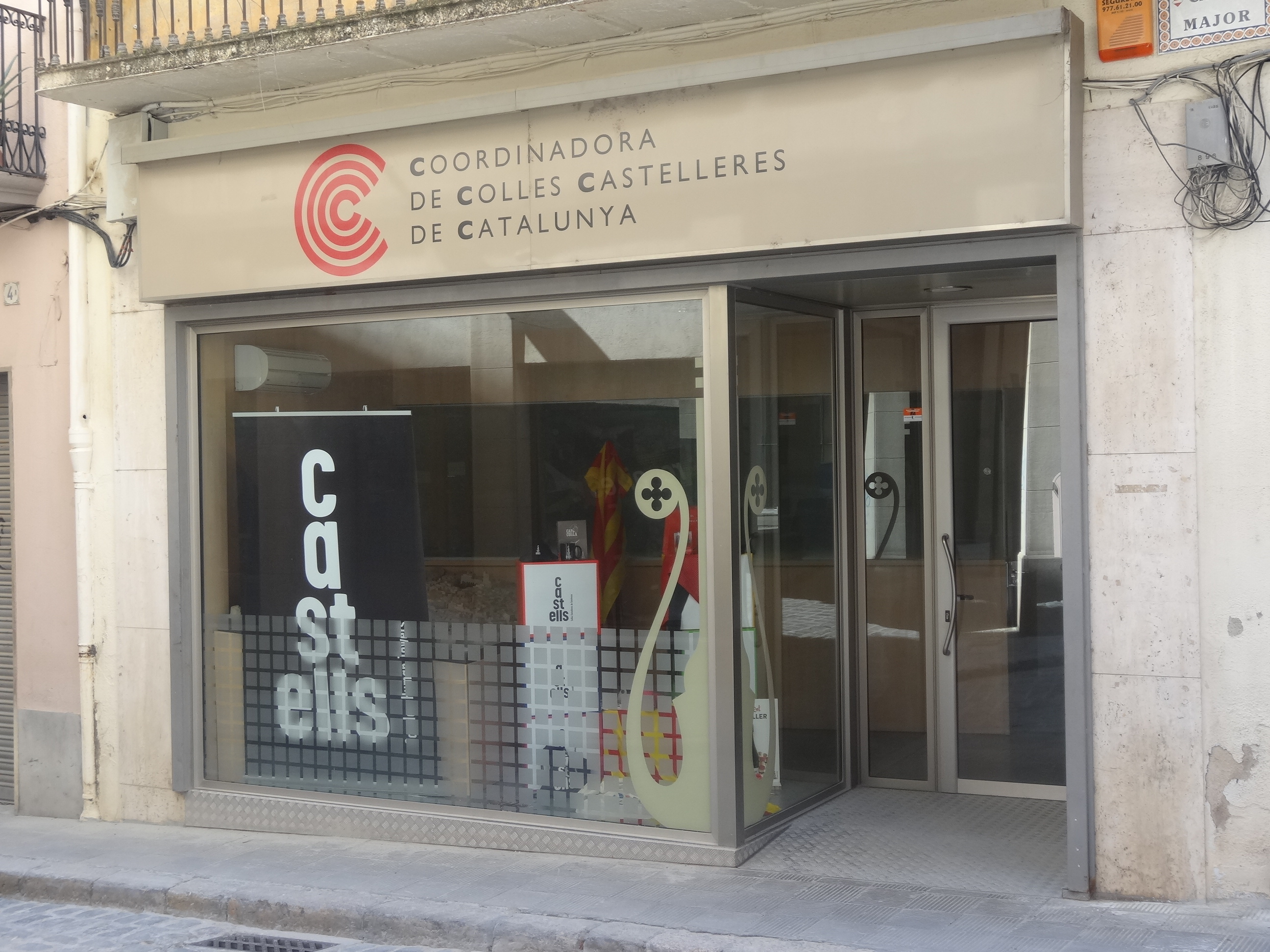 Seu de la Coordinadora de Colles Castelleres de Catalunya, a Valls